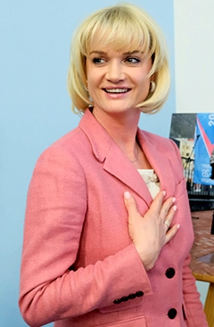 Светлана Васильевна Хоркина (род. 1979) — российская гимнастка